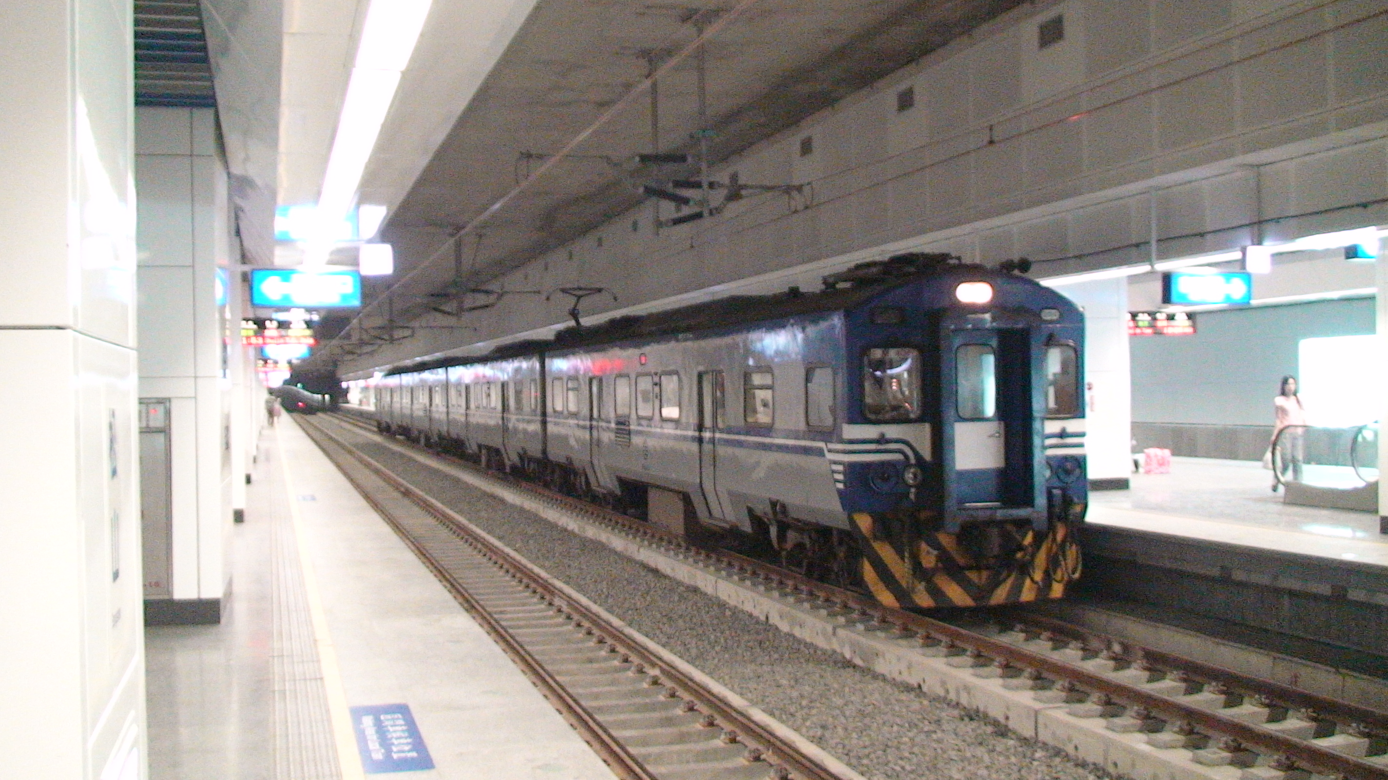 地下化後的松山車站台鐵月台層，圖中列車為台鐵EMU400型電聯車